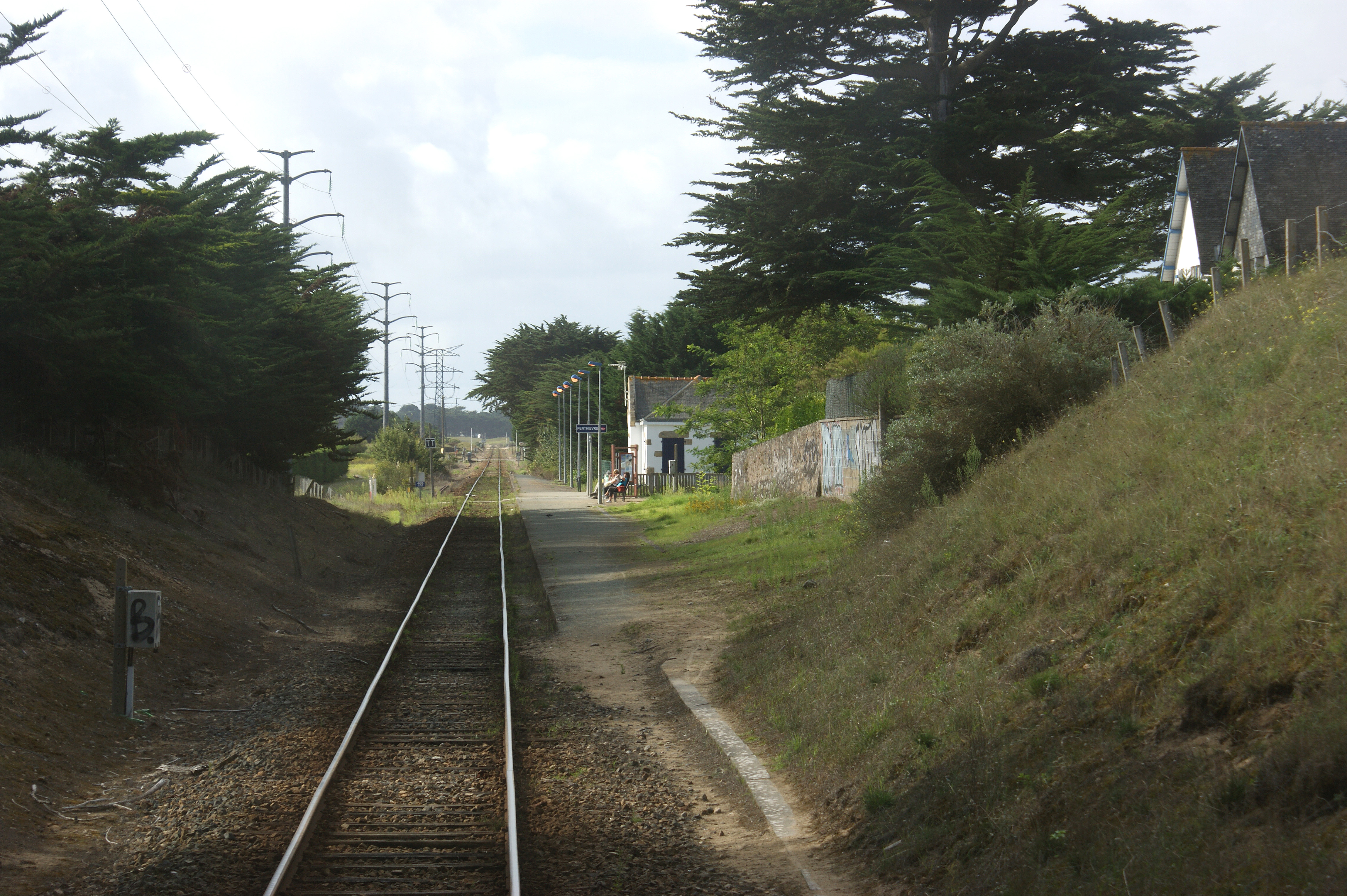 La halte de Penthièvre vue de la cabine du Tire-bouchon.